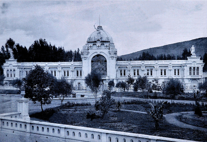 Vista de la fachada principal del Palacio de La Exposición, también llamado Palacio de La Recoleta o Ministerio de Defensa. Fotografía tomada en 1909, al poco tiempo de su inauguración, en la que todavía se aprecia la cúpula coronada por un cóndor que ya no existe en la actualidad. Delante se puede apreciar un poco de los jardines del palacio que actualmente conforman un parque público.